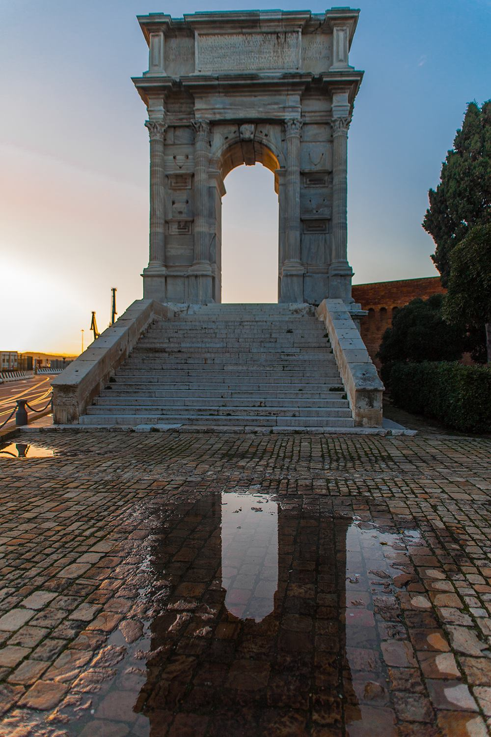 Arco di Traiano id: 0420025135 This is a photo of a monument which is part of cultural heritage of Italy.